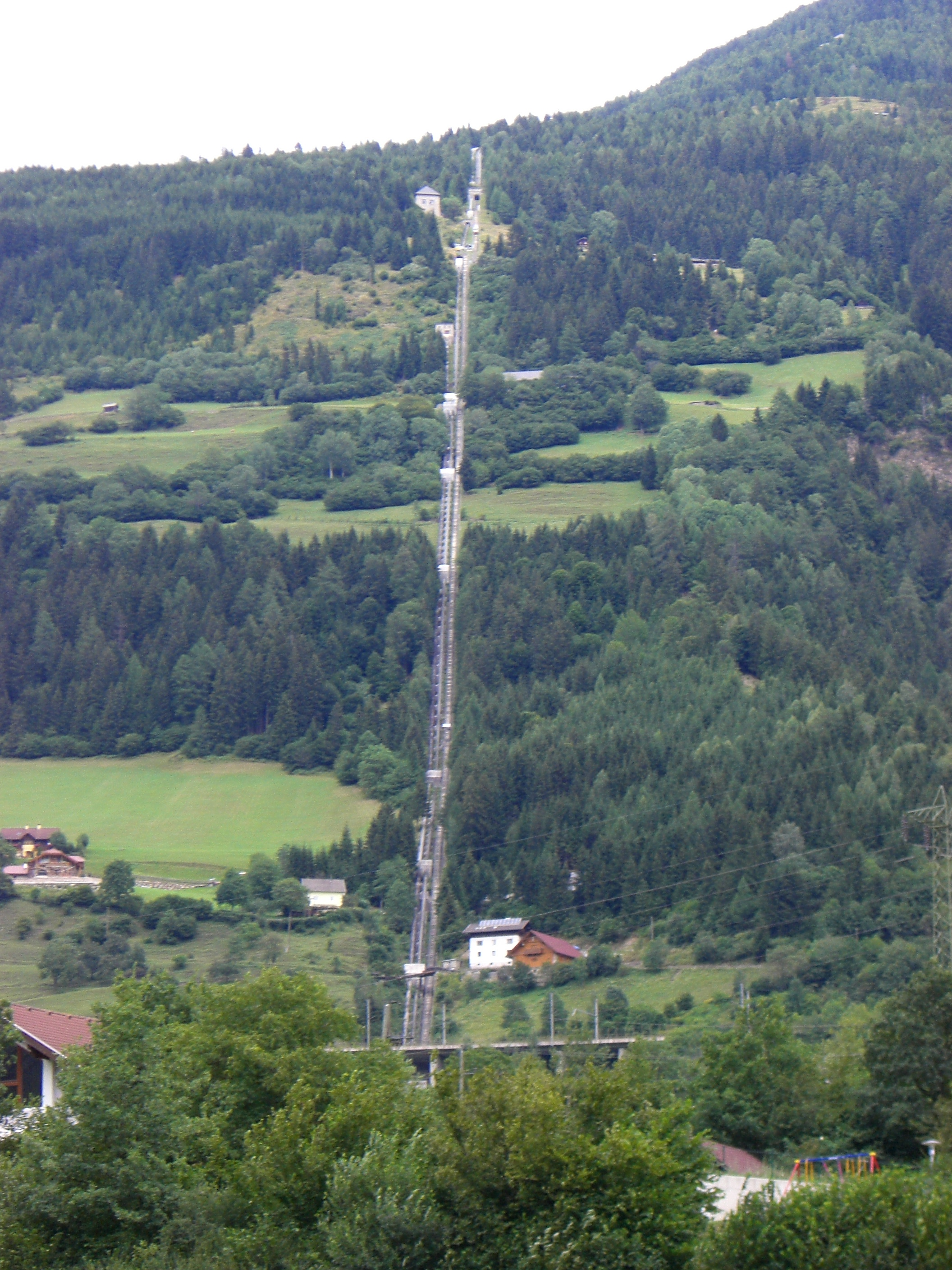 Reißeckbahn (funicular) in Reißeck, Carinthia, Austria